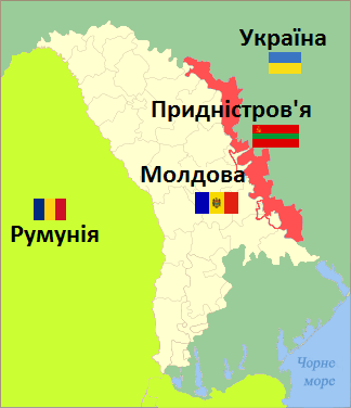 Картка Придністров'я